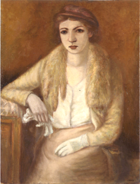 Tableau Femme au renard, de Léon Weissberg